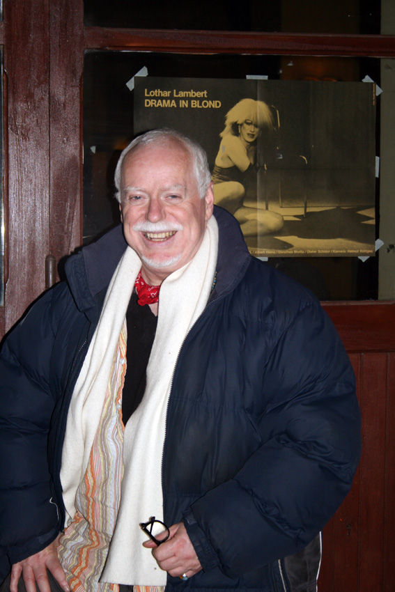 Lothar Lambert während der Filmwerkschau November 2008 in den Tilsiter Lichtspielen